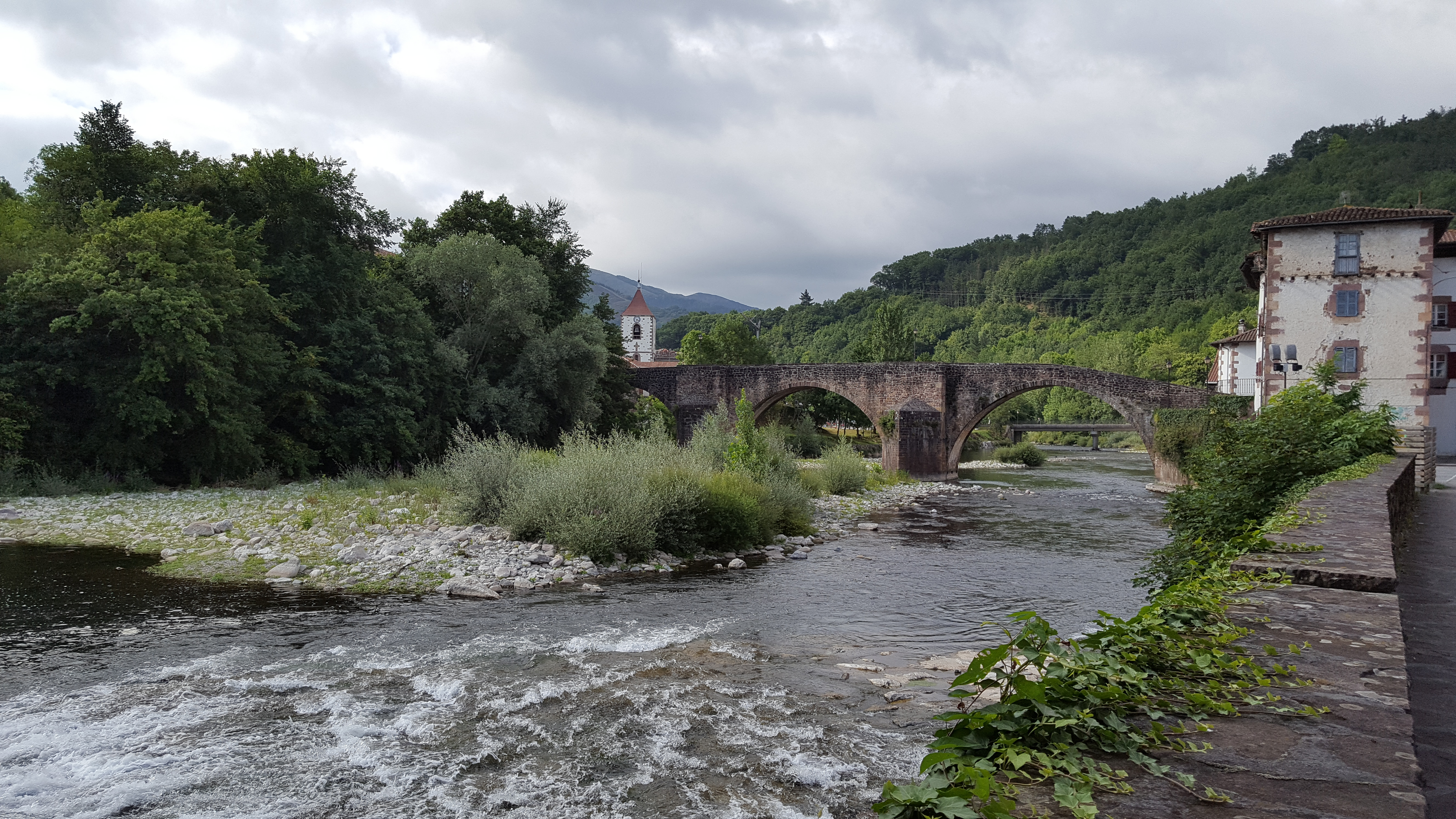 Nafarroako Sunbilla herria